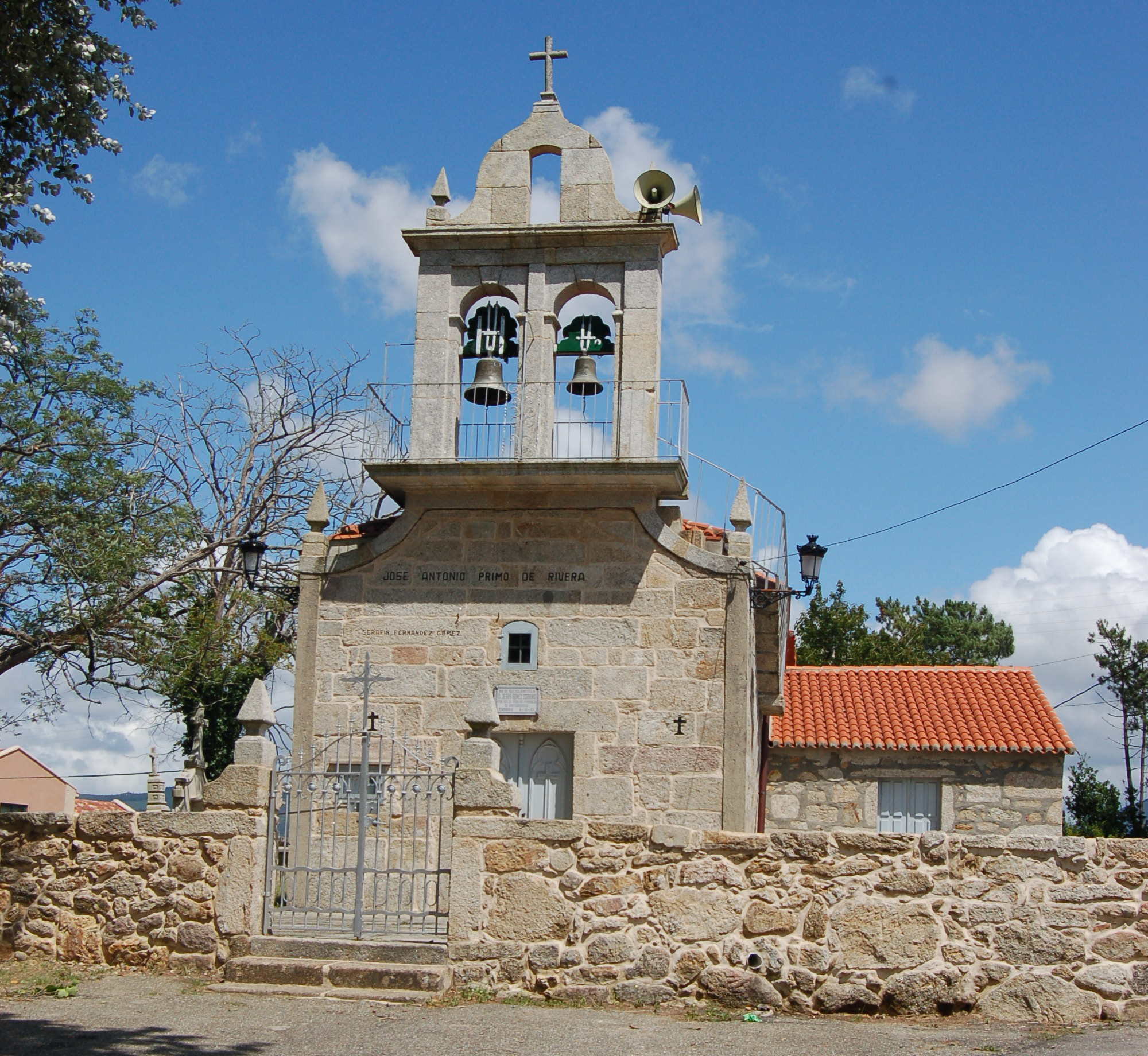 Igrexa parroquial de Currás (Tomiño).